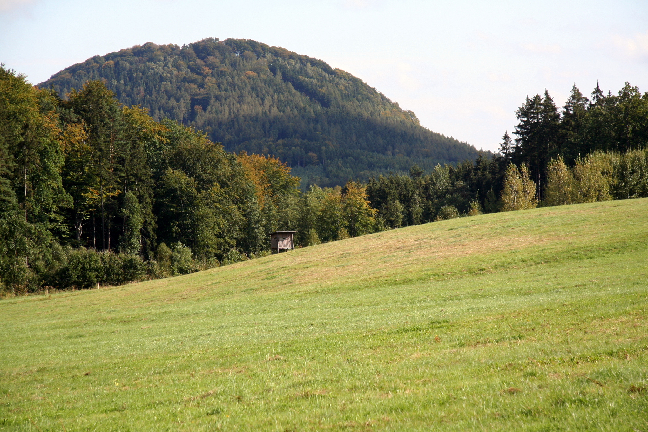 Der Ortelberg